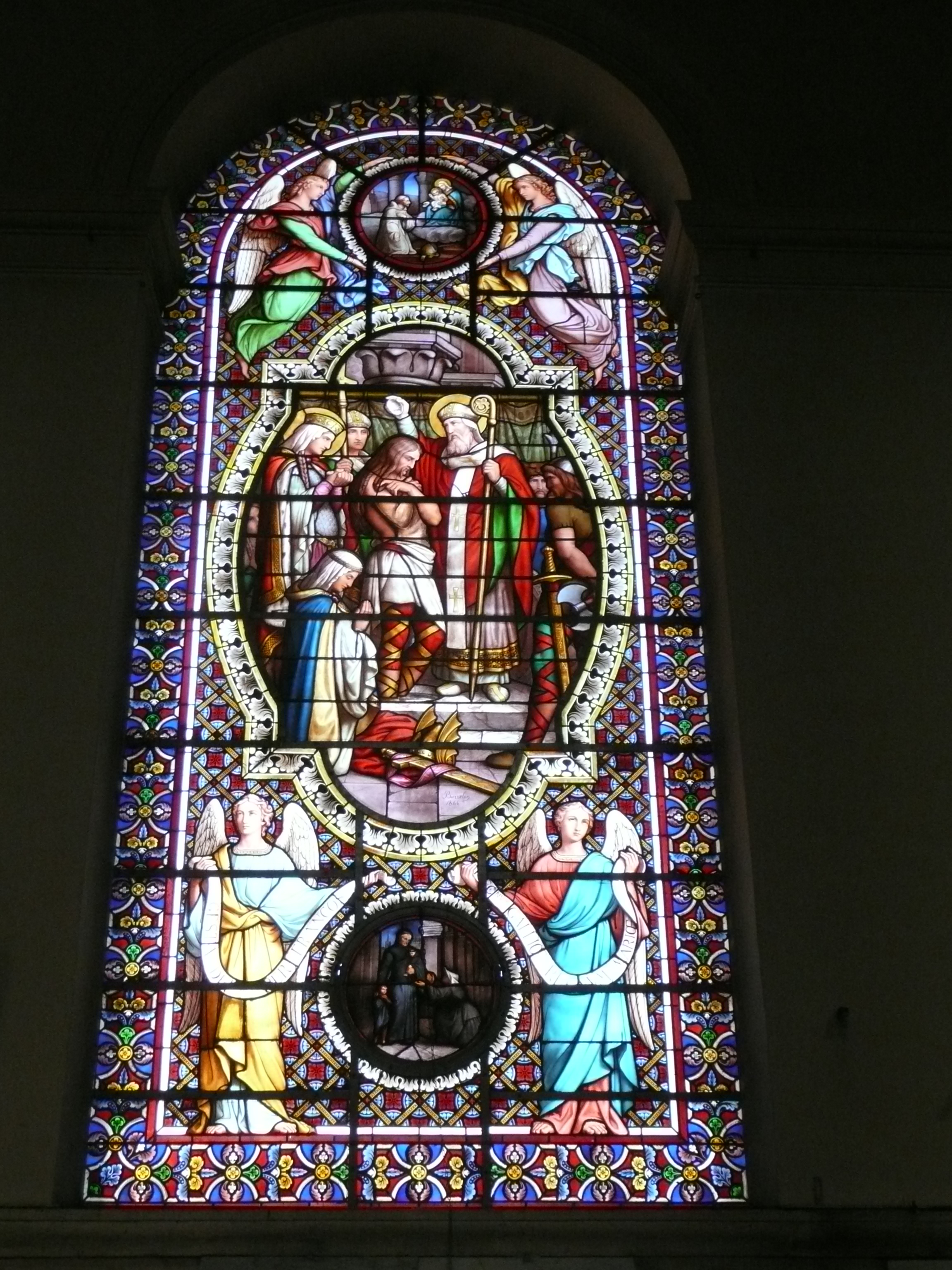 Vitrail de l'église cathédrale Saint-Vincent de Mâcon (France), représentant le baptême de Clovis. Les vitraux de cet édifice sont l'œuvre de l'atelier lyonnais de Jean-Baptiste Barrelon. Ils ont été réalisés entre 1858 et 1878, et installés à partir des années 1860. . Object location46° 18′ 27.04″ N, 4° 49′ 52.1″ E